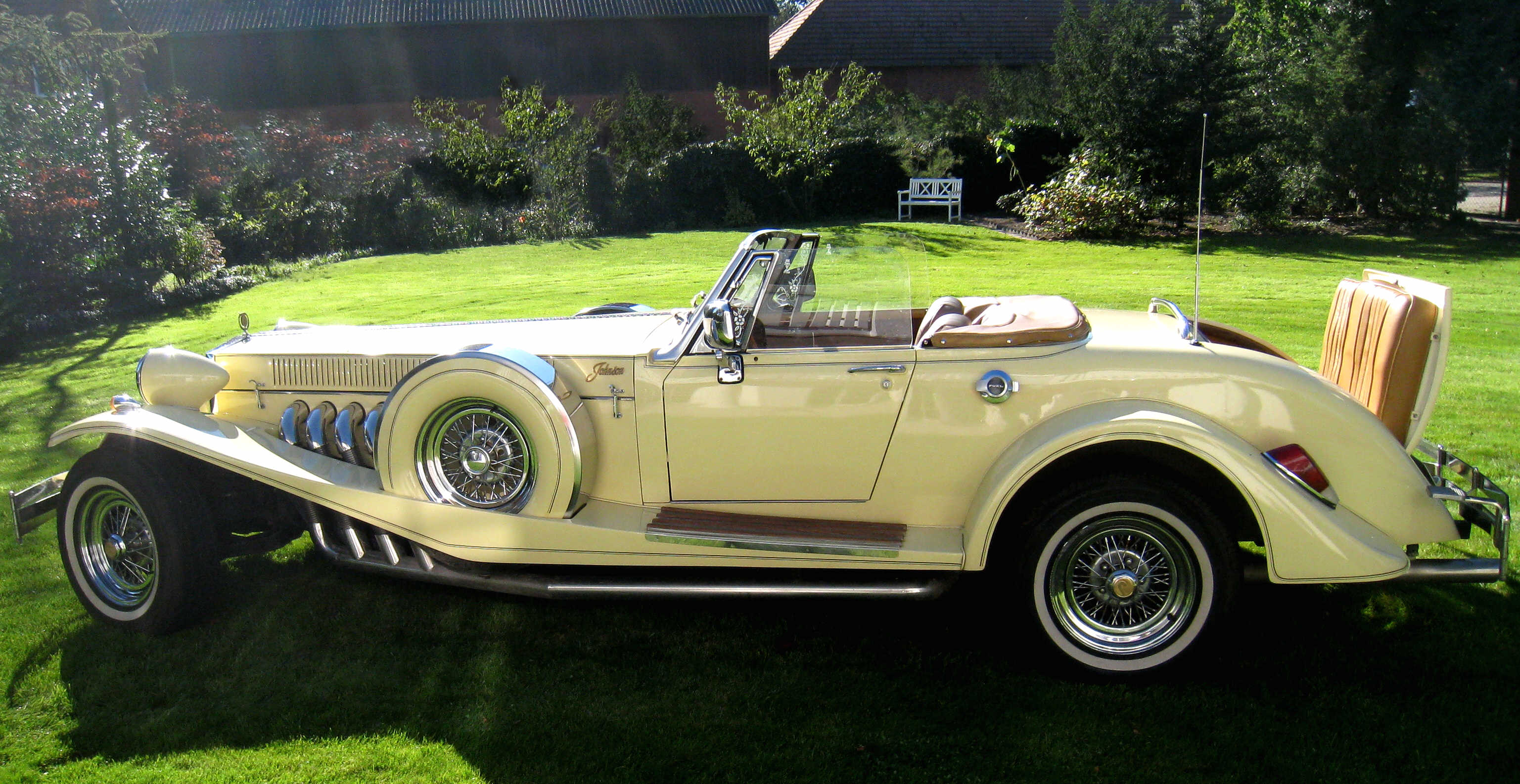 Der Johnson Presidential ist keine Replika oder ein Kit-Car sondern ein Neo Classik Wagen im Styl des legendären Duesenberg. In Handarbeit wurde dieser auf GM Chassi basierende Convertible durch die Firma Johnson Motor Car Company, in Pompano Beach ,Florida, hergestellt .